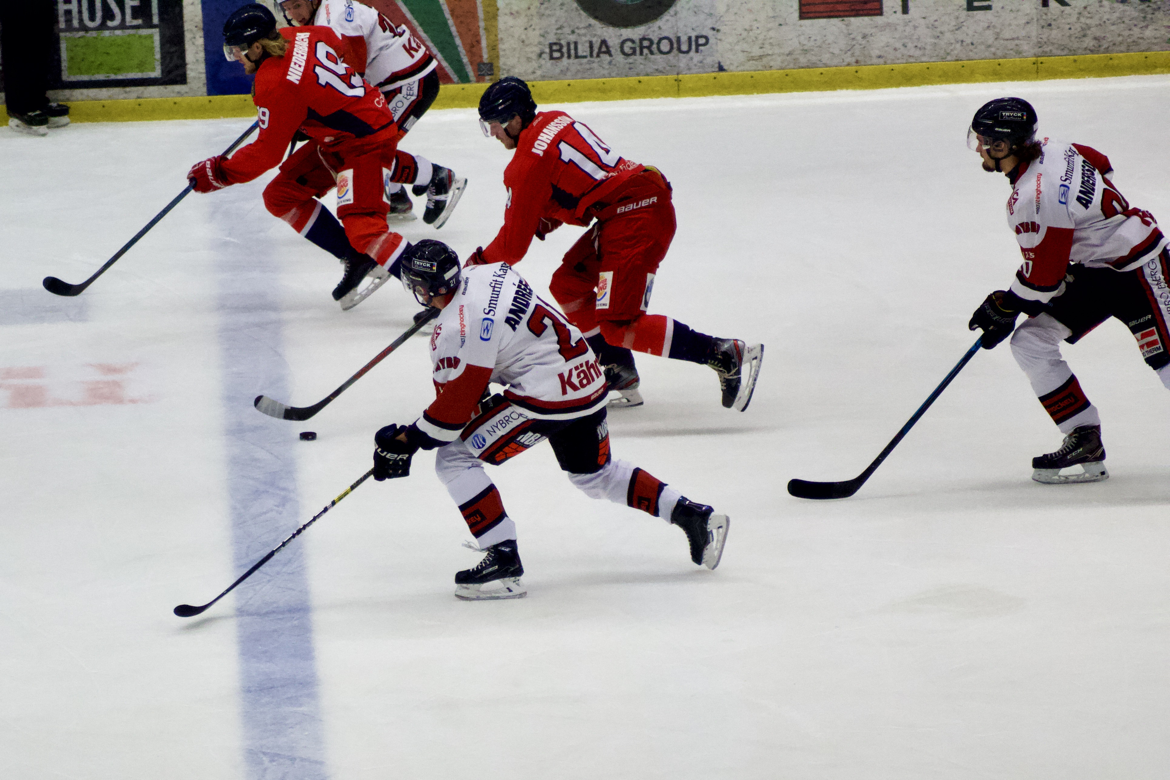 Matchinfo: . Spelare nr 19 Ludwig Niederbach och nr 14. Fredrik Johansson för Hanhals (rött). Nr 21 Hampus Andreen och nr 90 Alfred Andersson för Nybro (vitt).